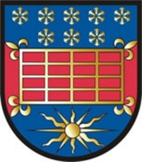 Das Symbol des heiligen Laurentius, den römischen Märtyrer und Pfarrpatron von St. Lorenzen am Wechsel wird durch den Rost dargestellt. Die heilige Katharina der Kirche in Festenburg wird durch die Lilien an den Ecken des Rostes dargestellt. Die Schneekristalle im oberen Teil und die Sonne im unteren Teil des Wappens stellen den Wechsel des Wetters in St. Lorenzen dar.